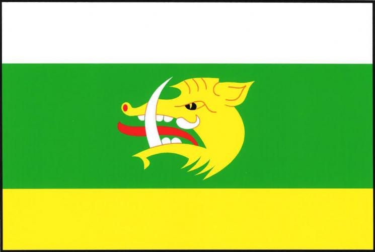 vlajka, Háje, okres Příbram